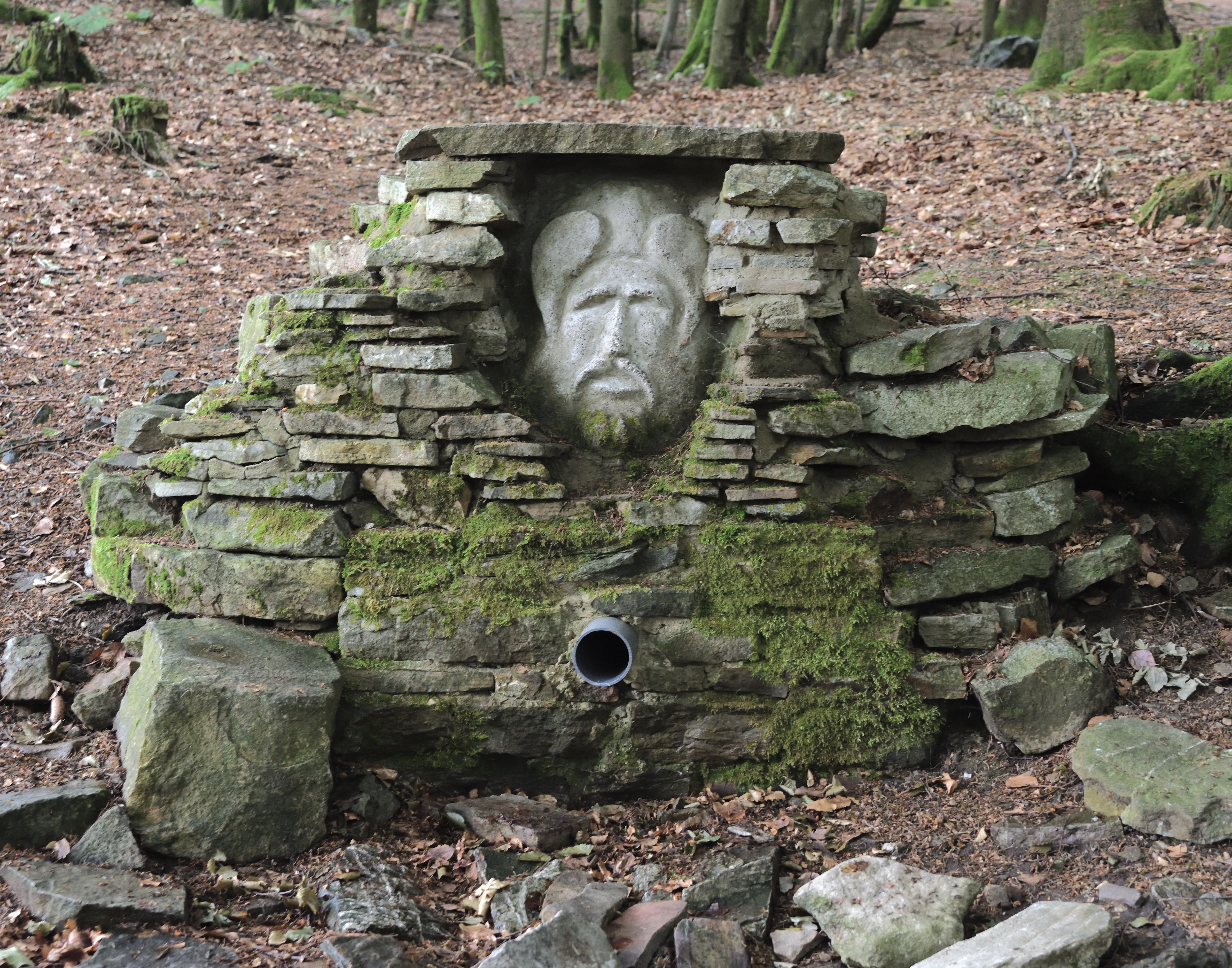 Keltenburg bei Otzenhausen, Quelle